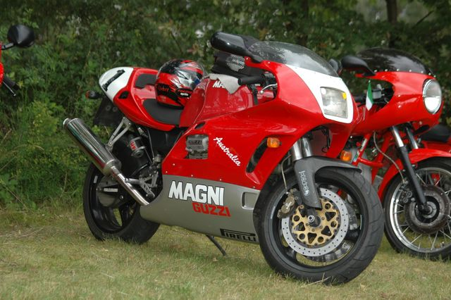 Magni-Guzzi Australia 93